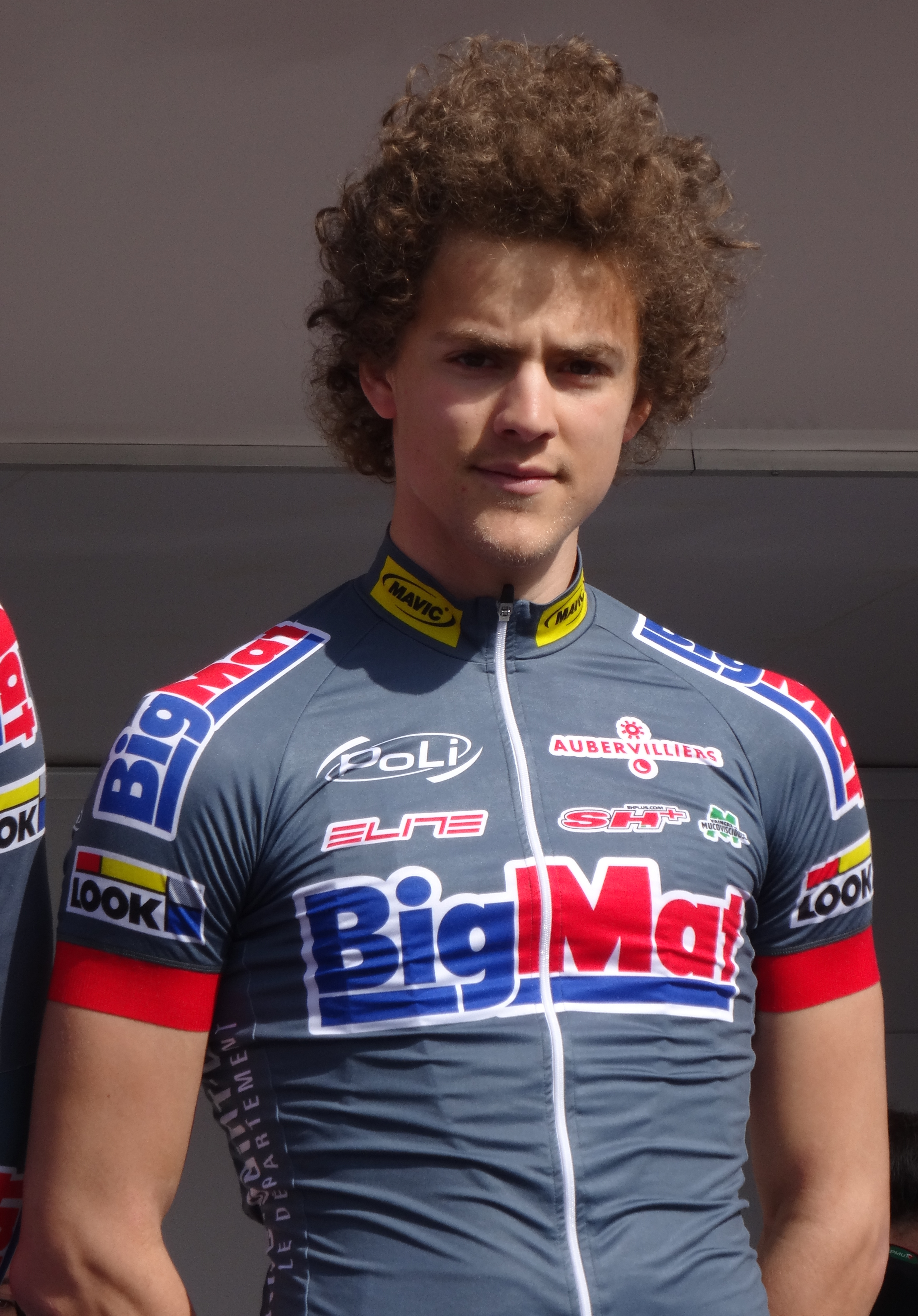 Reportage réalisé le jeudi 17 avril à l'occasion du départ et de l'arrivée du Grand Prix de Denain 2014 à Denain, Nord, Nord-Pas-de-Calais, France.